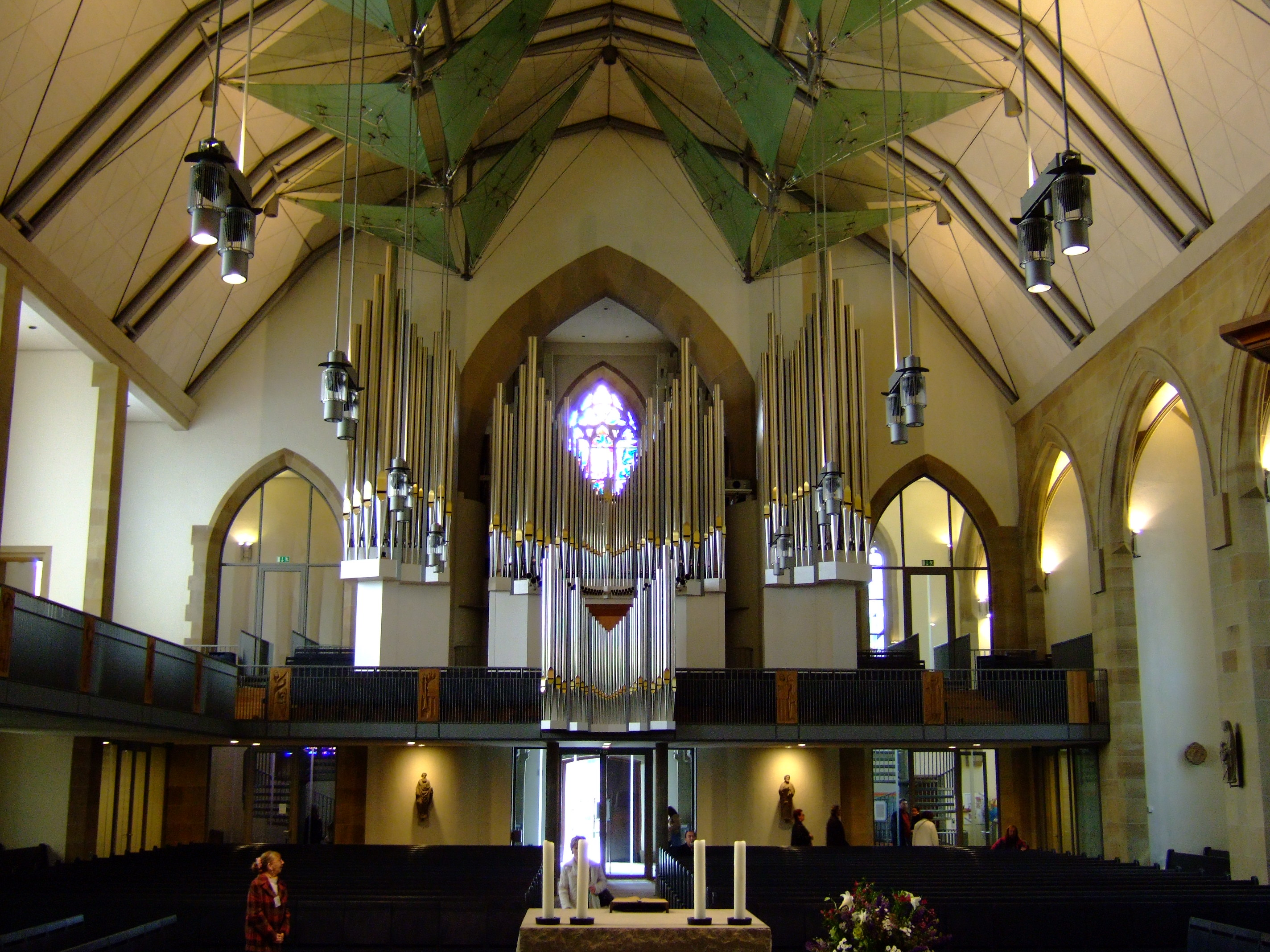 Blick zur Empore und Orgel in der Stiftskirche Stuttgart, Deutschland